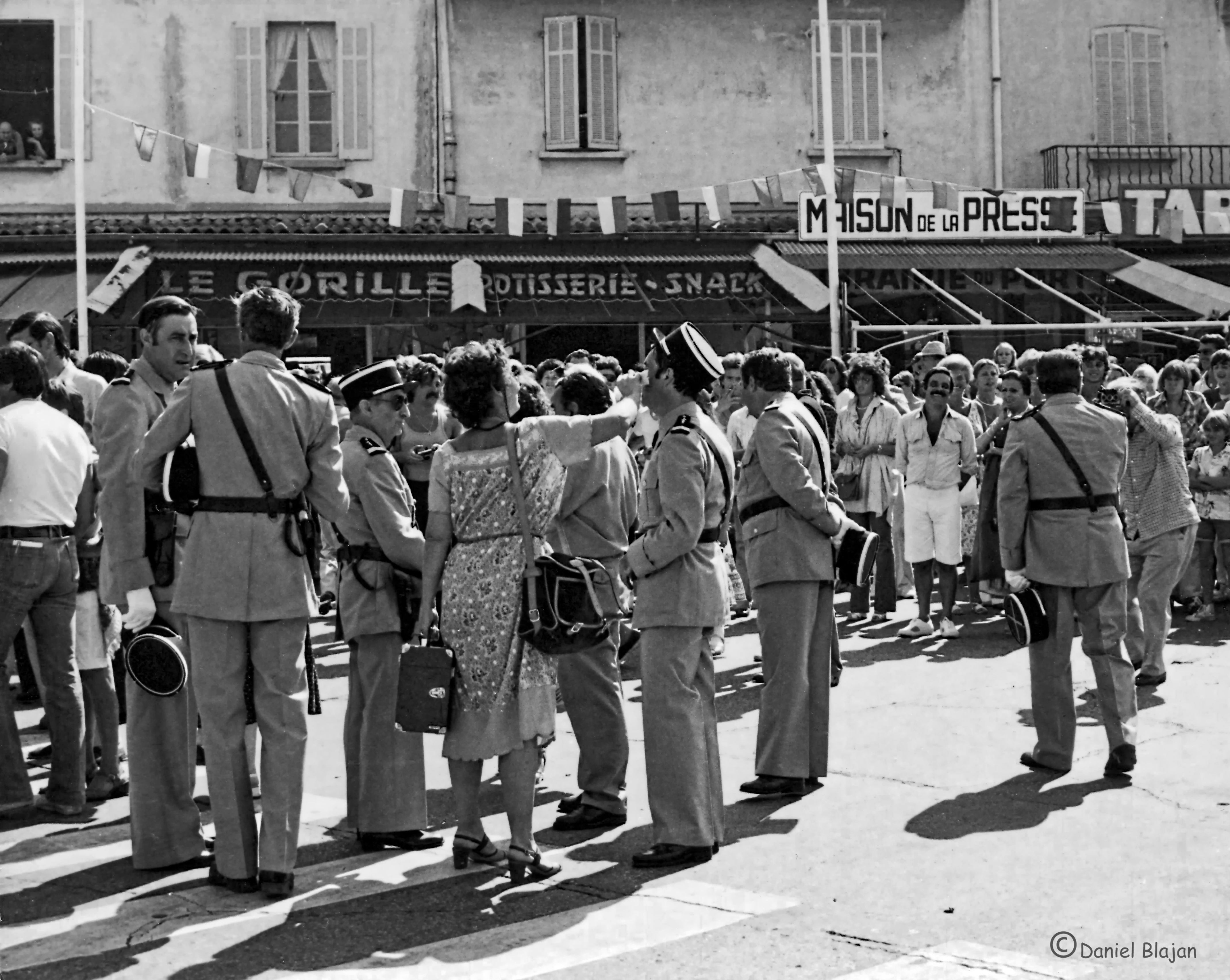 Pause durant le tournage du film Le Gendarme et les Extra-terrestres en 1978, à Saint Tropez.